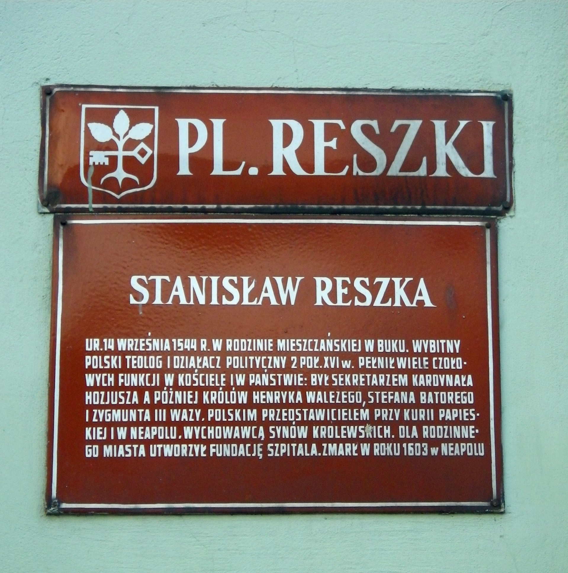 Tablica poświęcona Stanisławowi Reszce na Placu Reszki w Buku (pow. poznański)